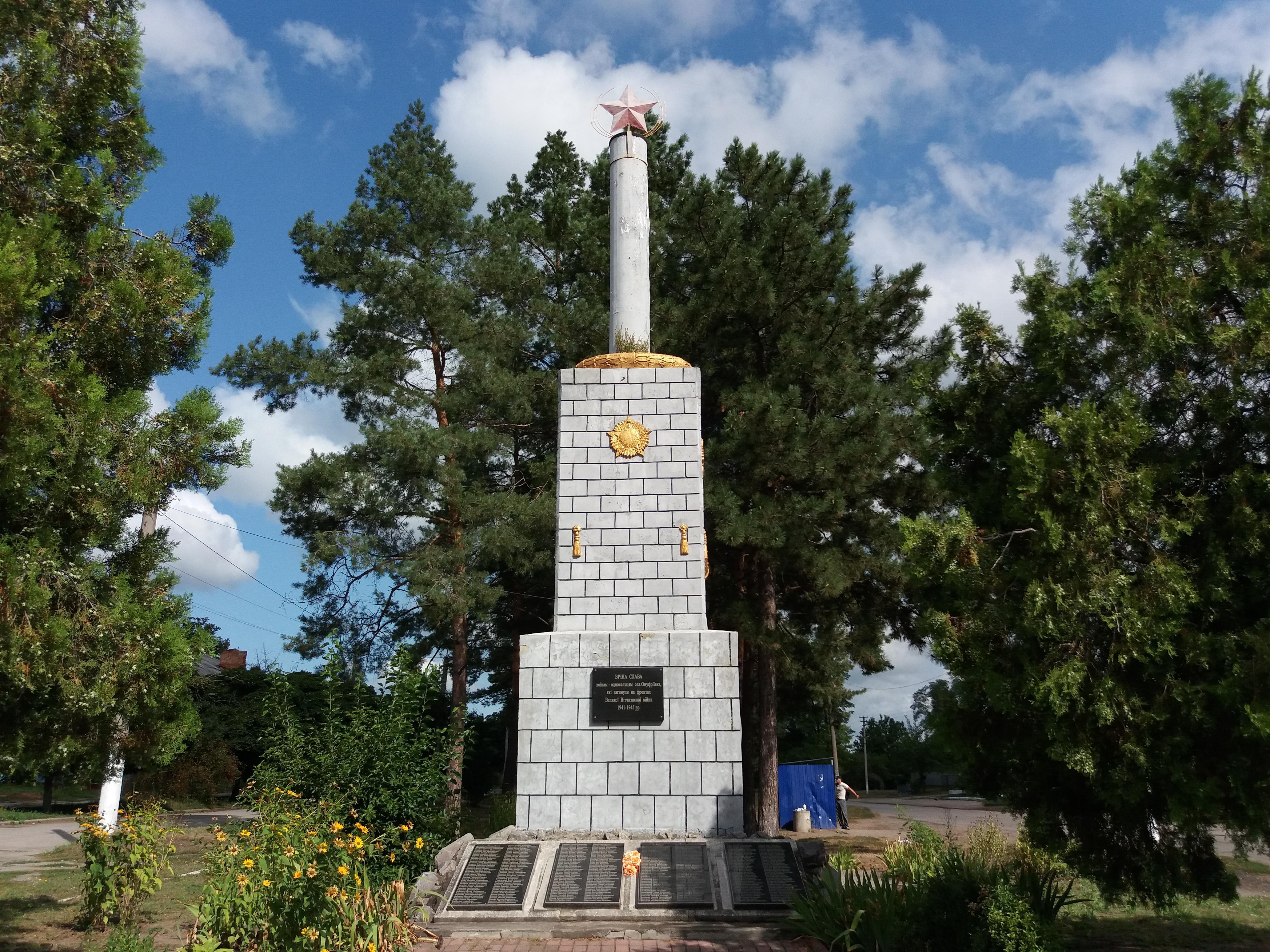 Пам'ятник воїнам — землякам., Онуфріївка, центр